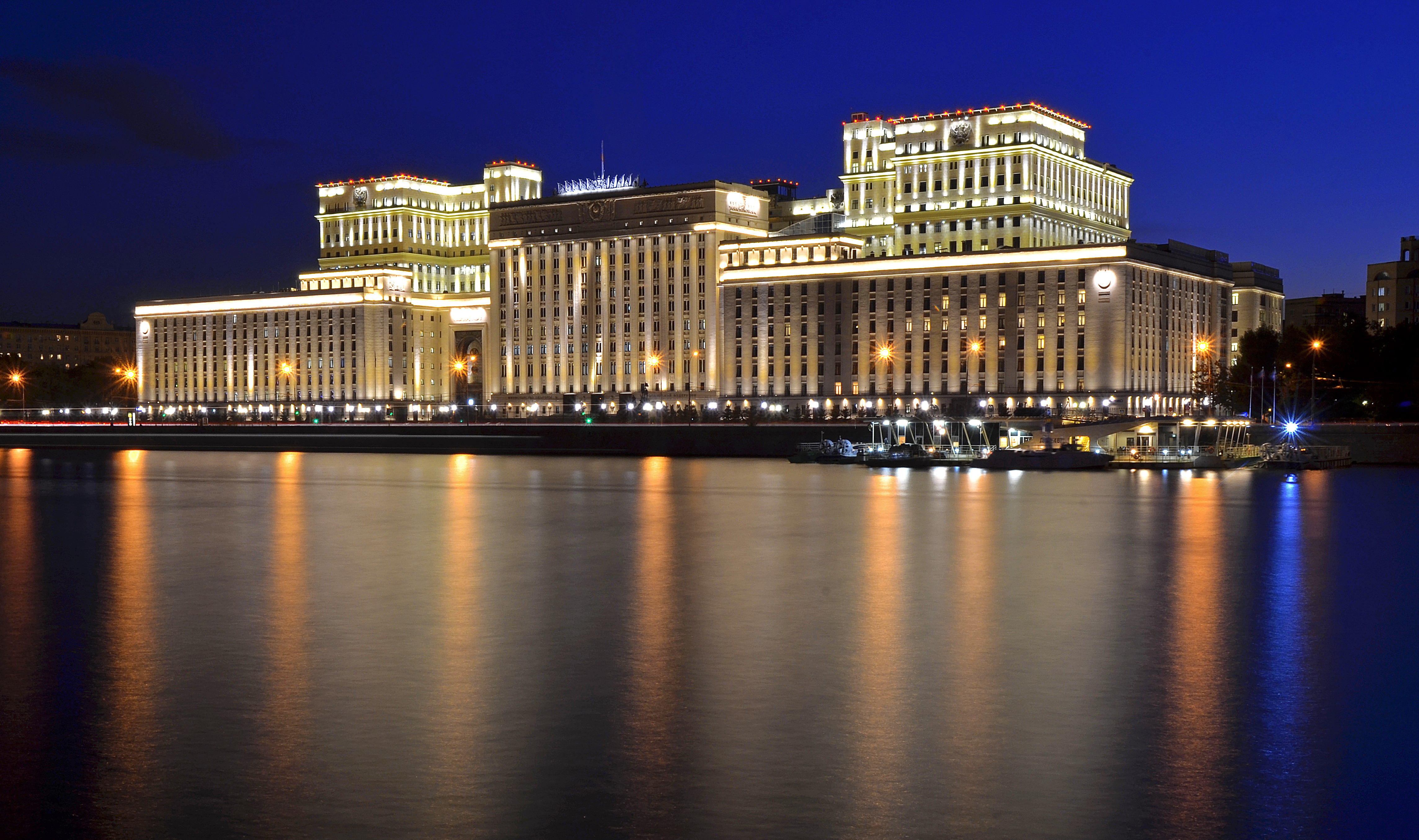 Подробнее здесь